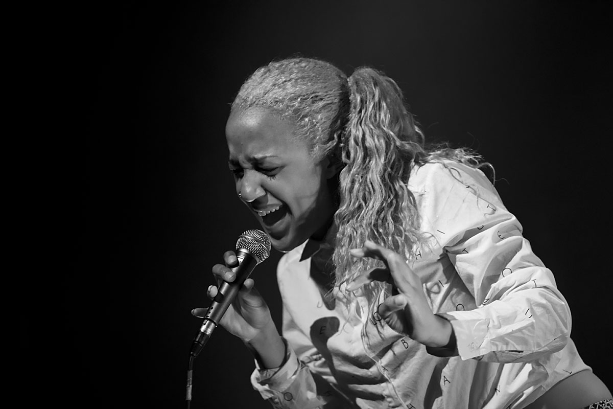 Barbara Moleko på Forbrændingen 1. marts 2013